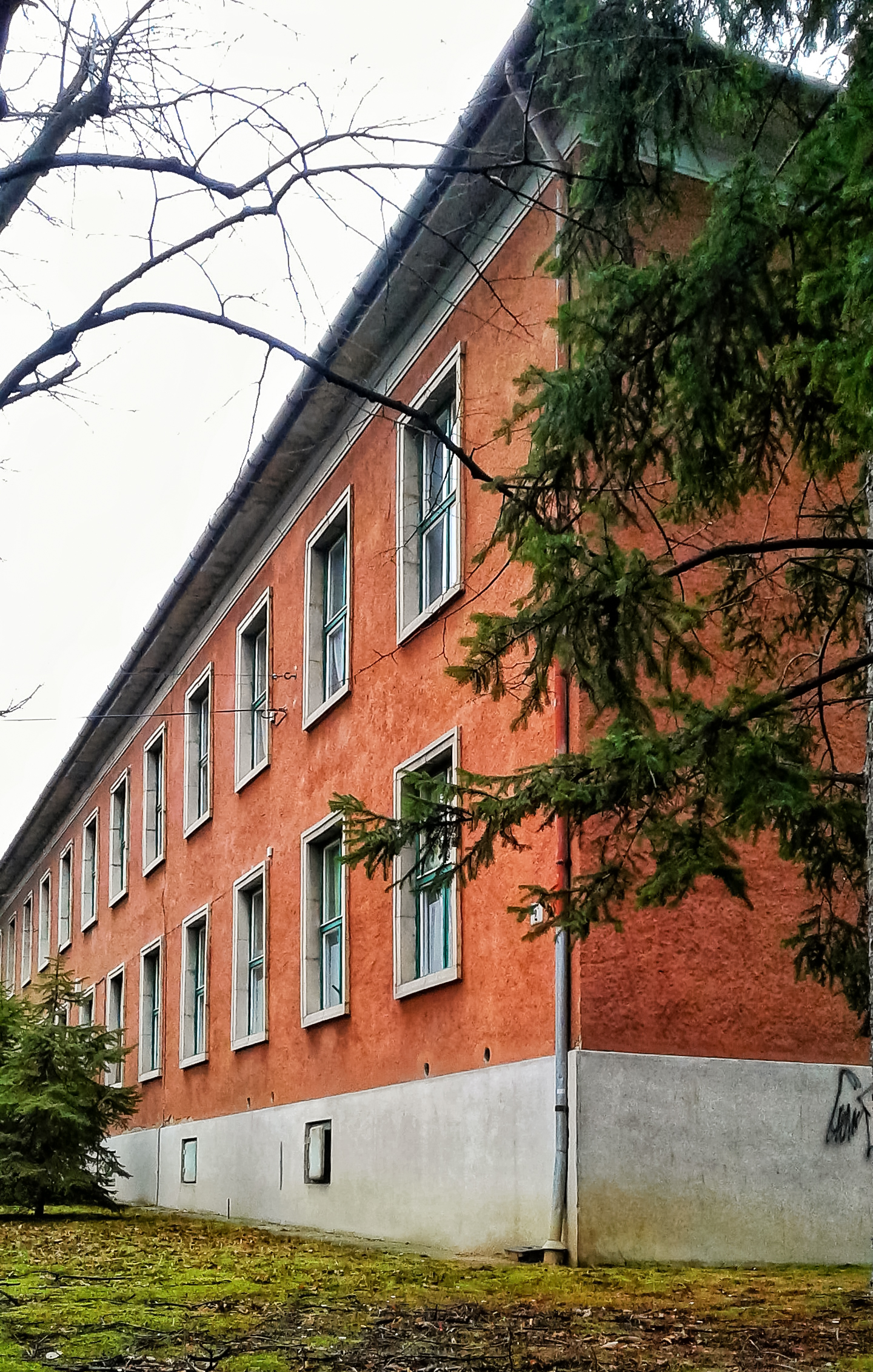 A Nagy László Gimnázium épülete 1959 és 2010 között